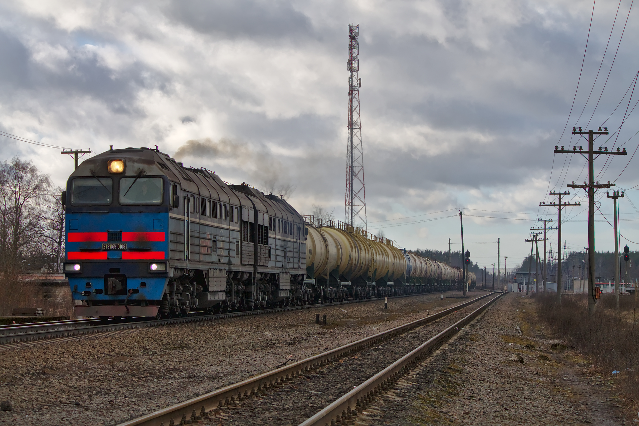 2ТЭ116У-0108, станция Кингисепп. см. фото 584281 в альбоме автора